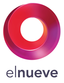 Nuevo logo con nuevo nombre lanzado el 1 de Enero de 2017.